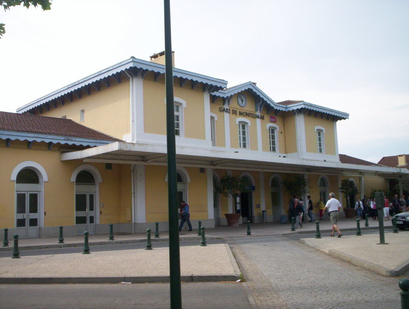 Façade de la gare de Montélimar, Drôme, France